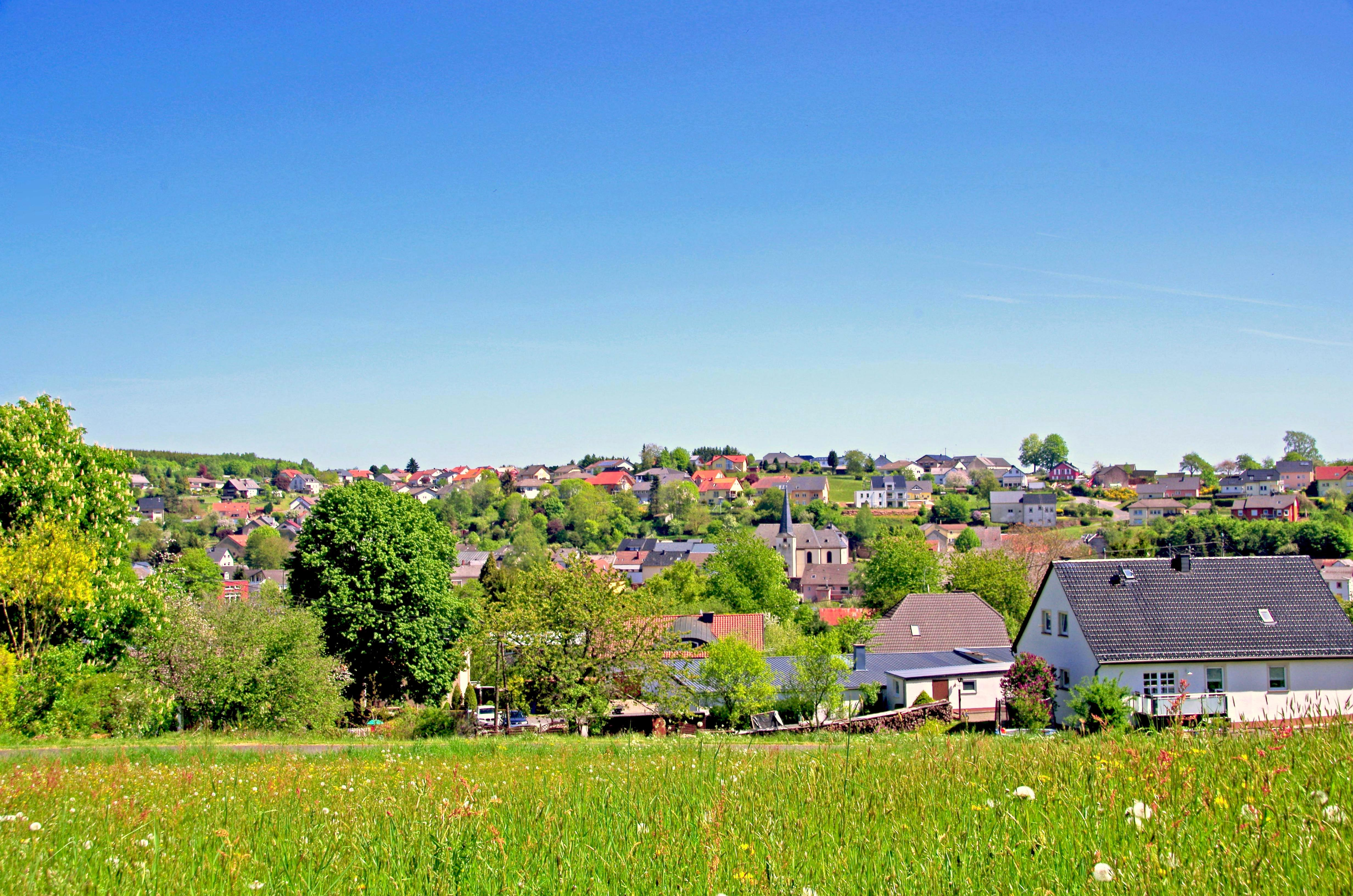 Neidenbach